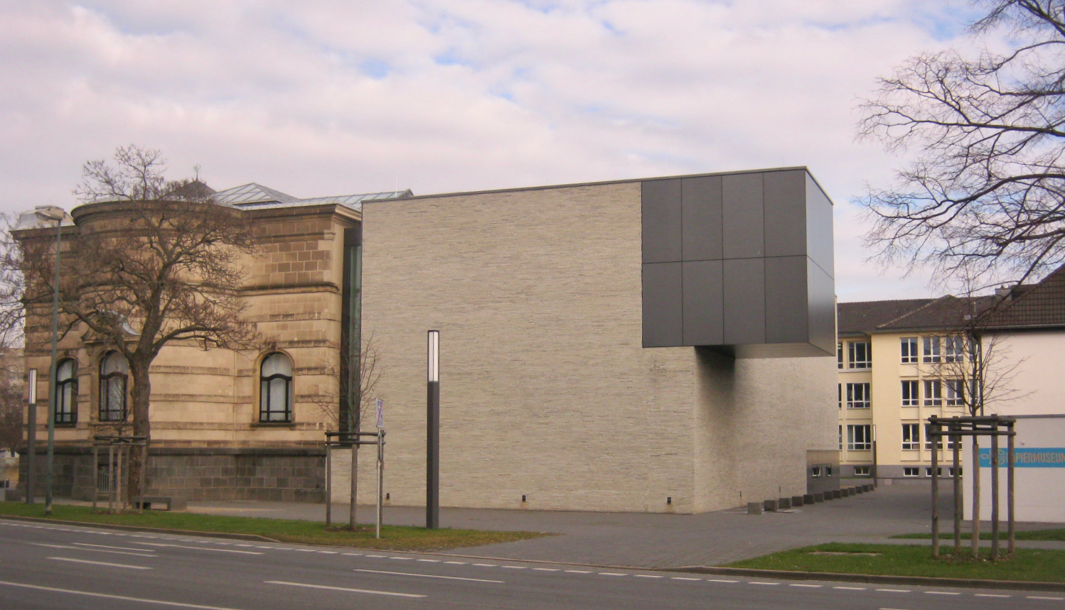 Der neue Anbau des Leopold-Hoesch-Museums in Düren